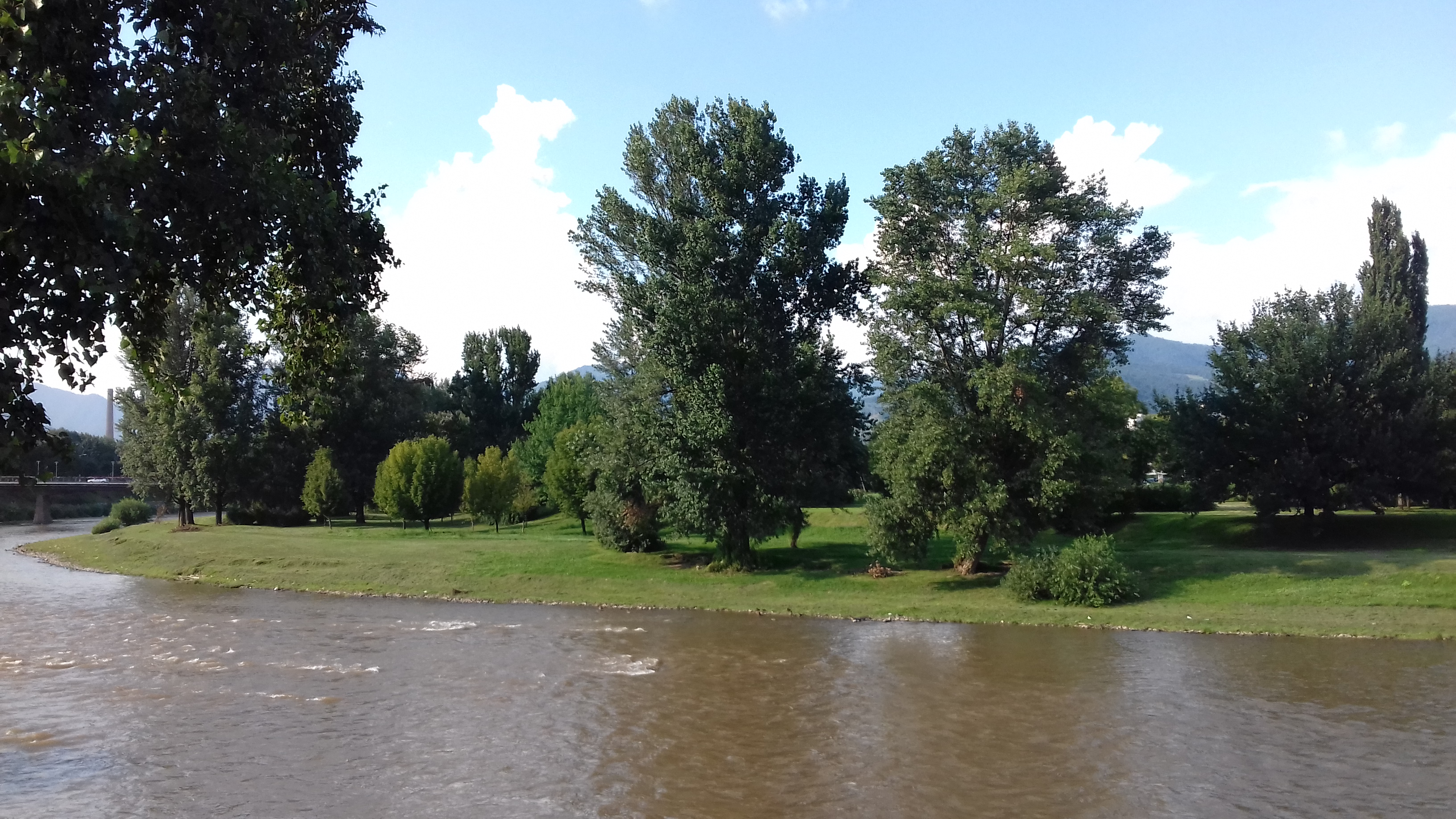 Зеница, пејзаж